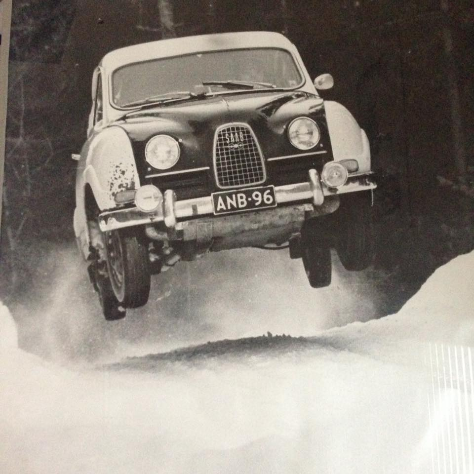 Ralph Lindy Saab-ajokillaan